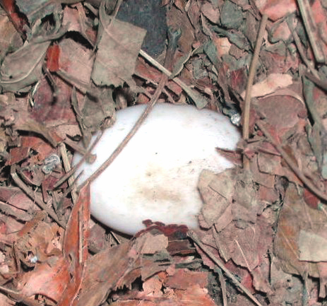 Ee_vun_enger_Deckelsmouk.